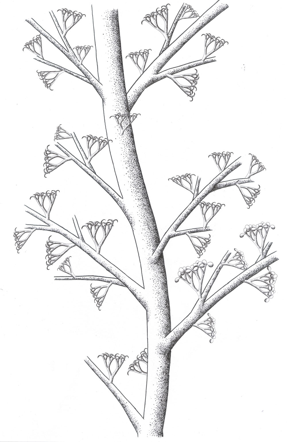 Reconstrucción de la anatomía externa del vegetal devónico Ibyka amphikoma Skog et Bank, 1973 a partir de la descripción original.